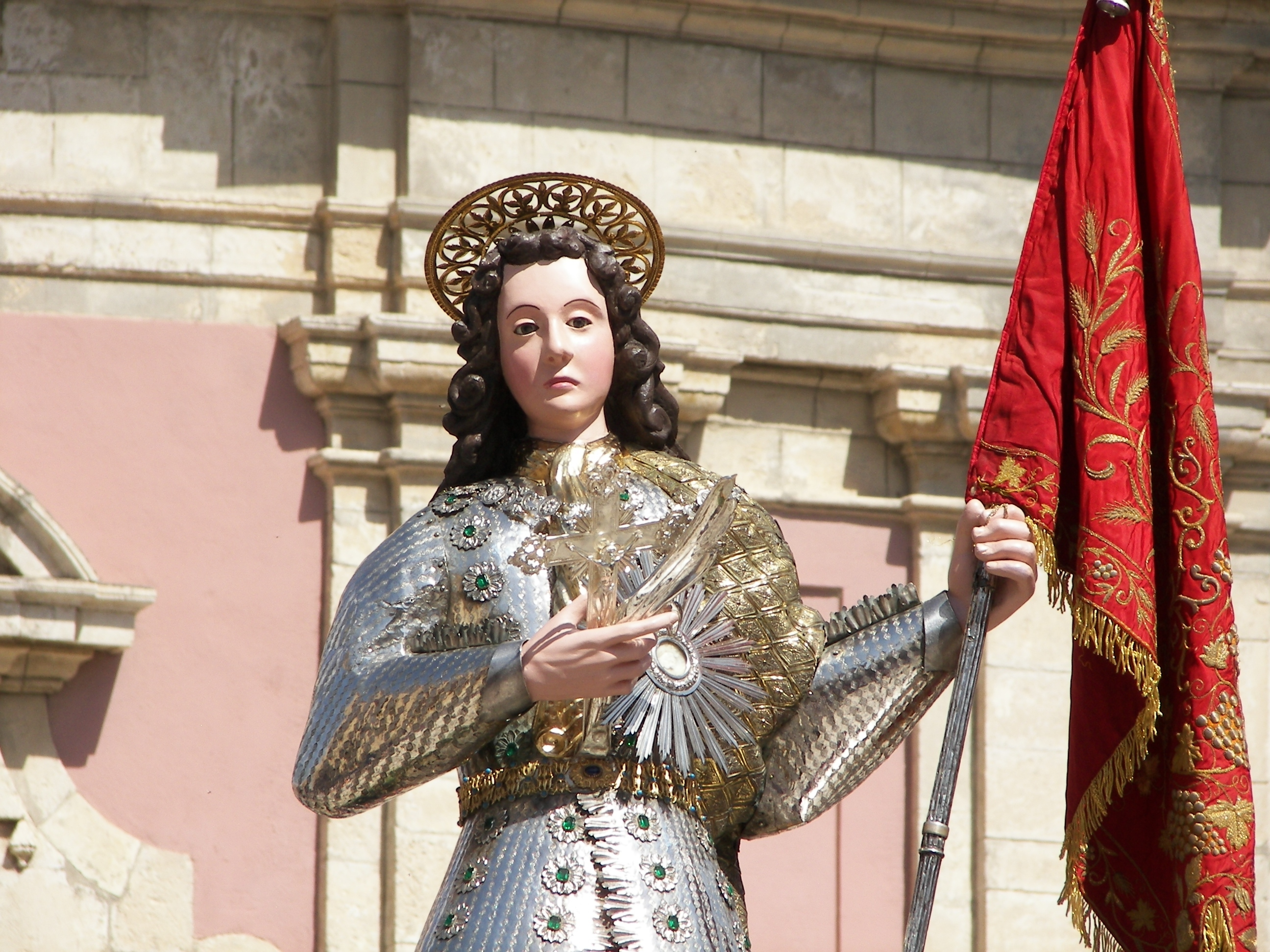 particolare della statua di san Prospero da Centuripe